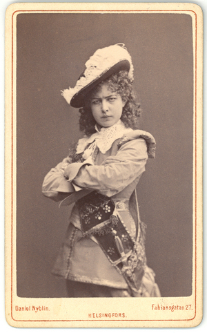 Фанни Синебрюхова, артистка Шведского театра в Хельсинки